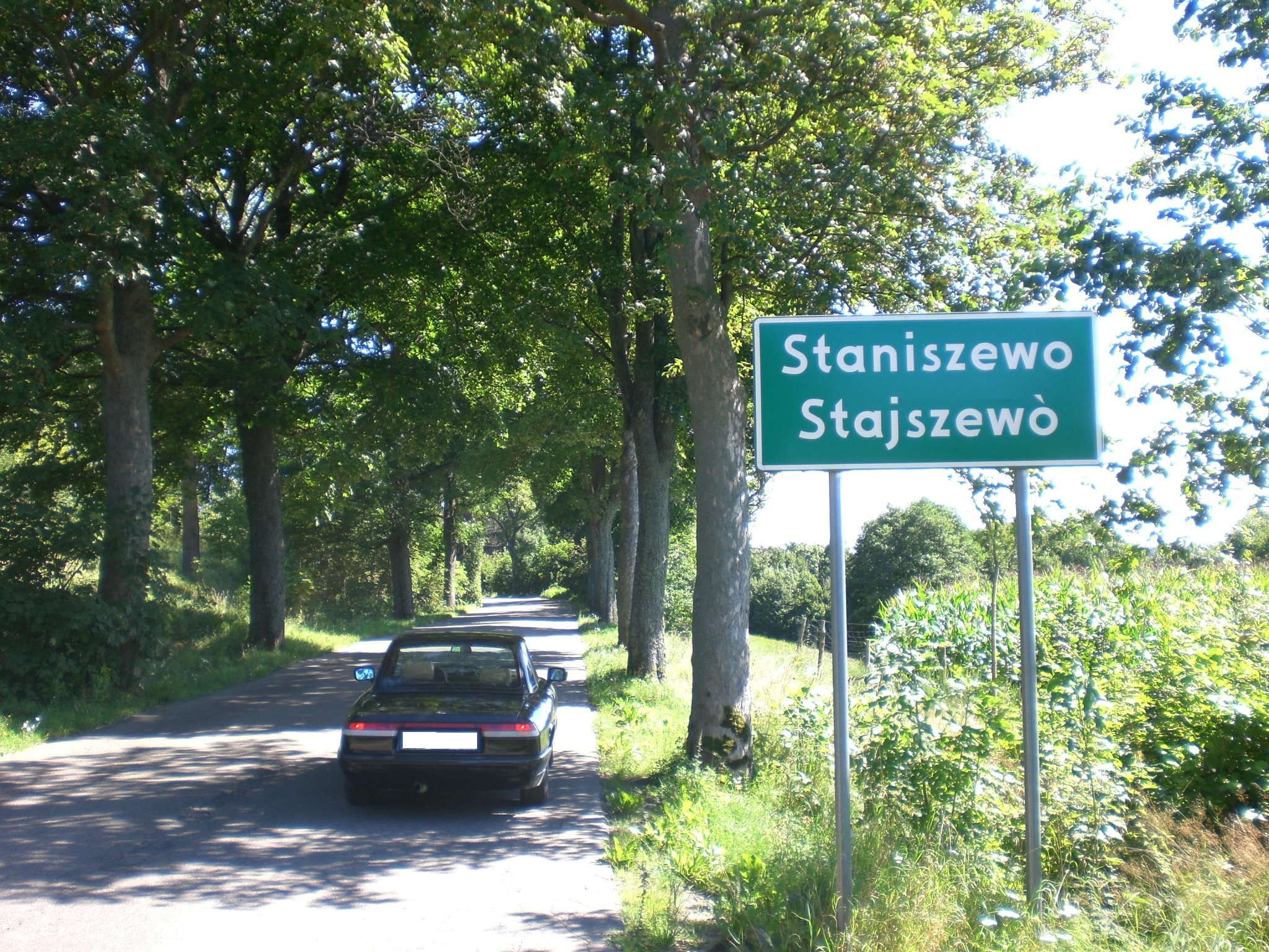 Staniszewo